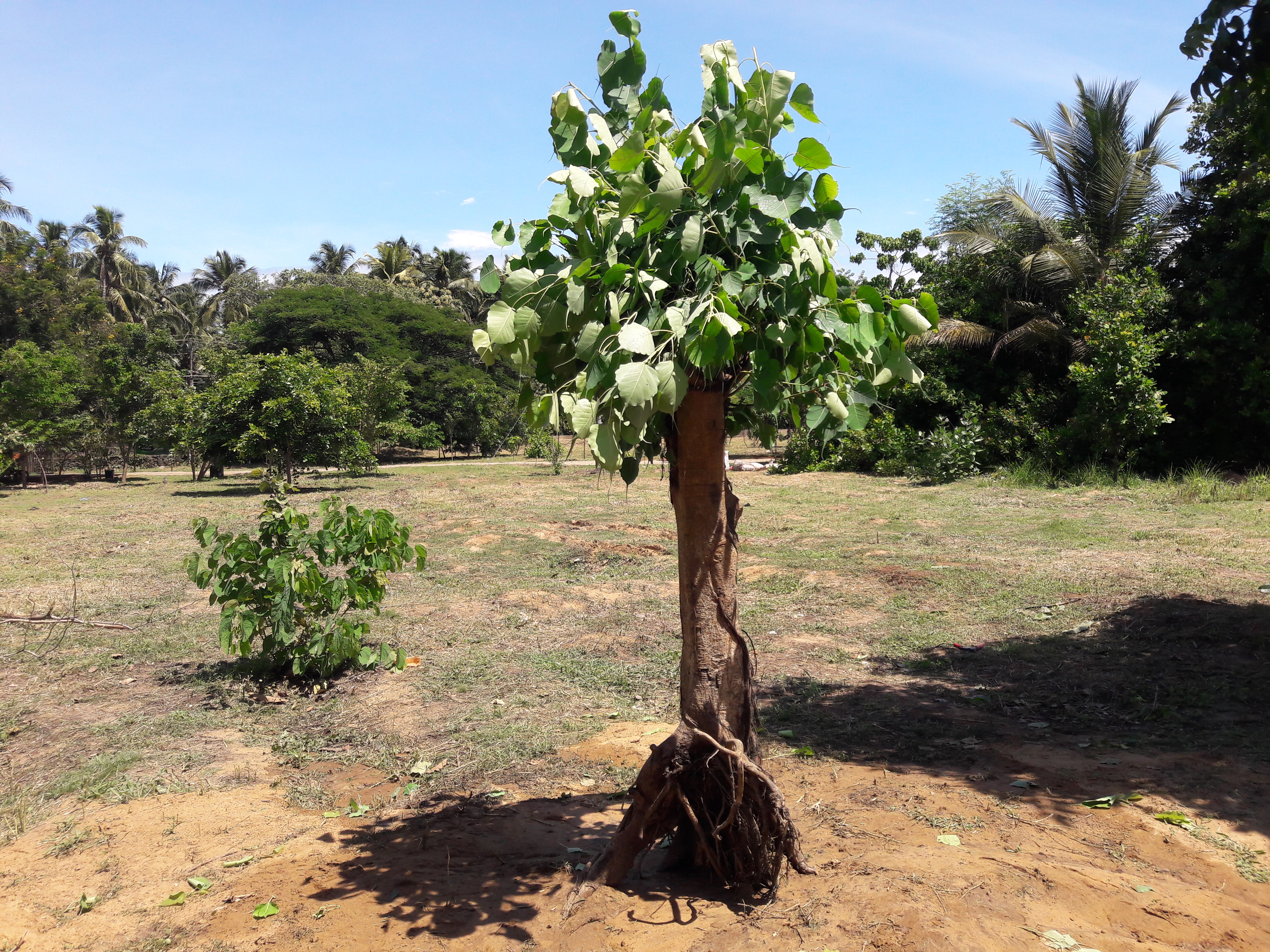 വനവല്‍ക്കരനത്തിന്റെ ഭാഗമായി സ്പീക്കര്‍ ശ്രീ പി.ശ്രീരാമകൃഷ്ണന്‍ അവര്‍കള്‍ പൊന്നാനി ഈശ്വരമംഗലം ശ്മശാനത്തില്‍ നട്ട അരയാല്‍ മരം. Peepal tree (Sacred fig) ശാസ്ത്രീയ നാമം Ficus religiosa കുടുംബം Moraceae.